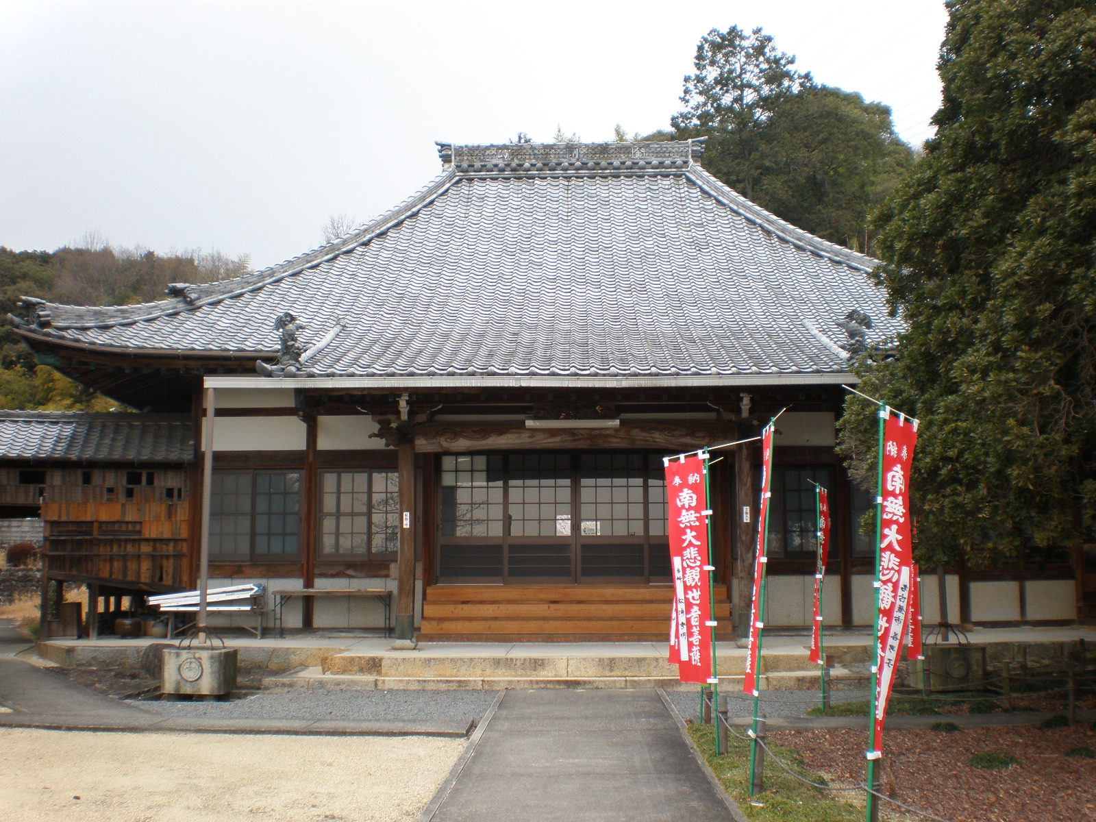 愛知県小牧市にある大泉寺の本堂